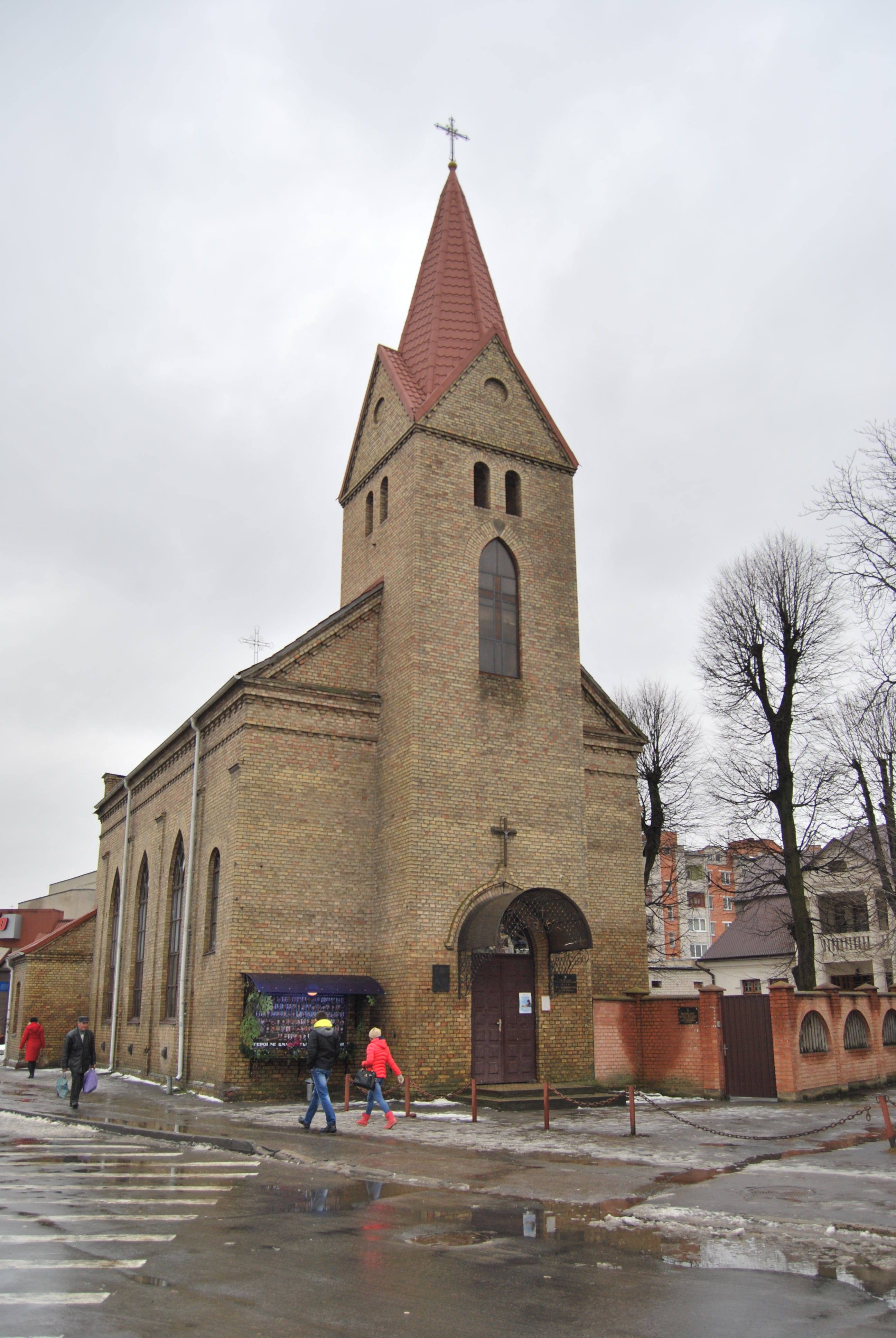 Кірха (мур.), Володимир-Волинський, вул. Ковельська, 45